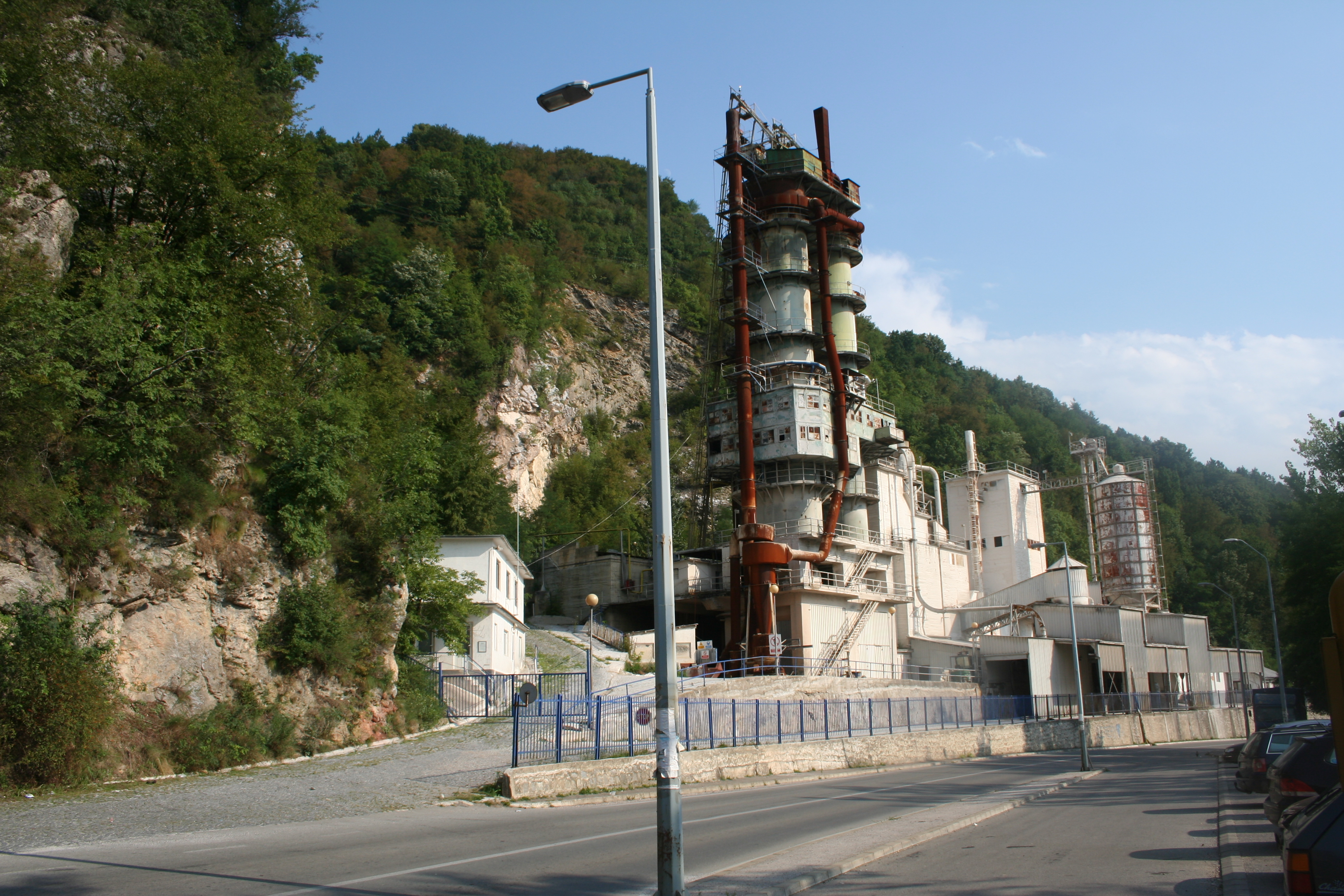 Krečana Ravnaja, Mali Zvornik